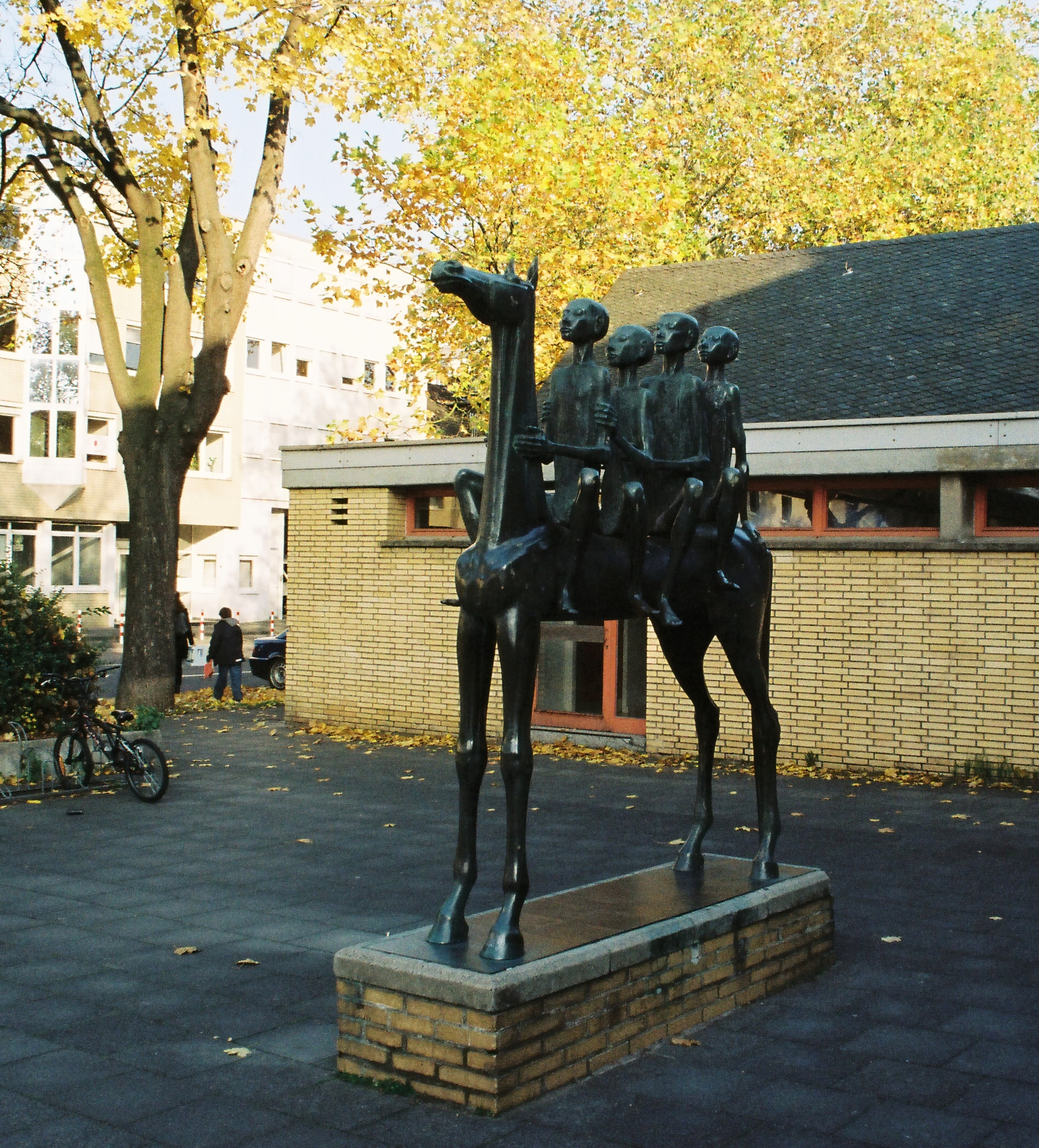 „Die vier Haimonskinder“, Figurengruppe aus Bronze auf Steinsockel, vor der Schule Geilenkircher Straße in Köln-Braunsfeld; 1969 geschaffen von dem deutschen Bildhauer Heinz Klein-Arendt (1916–2005) aus Bergheim-Oberaußem.